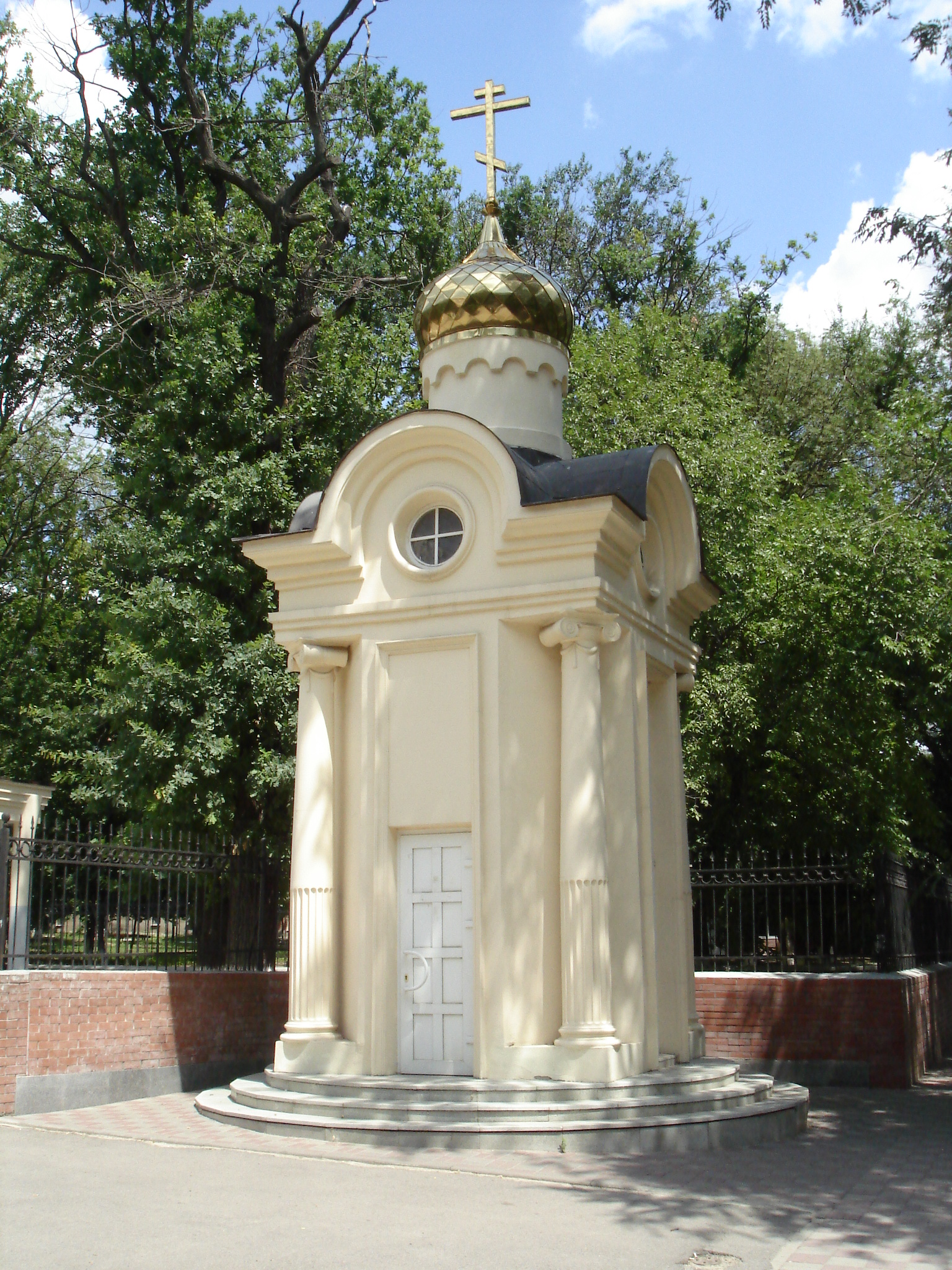 Новочеркасский политехнический институт, часовня Св. Татьяны